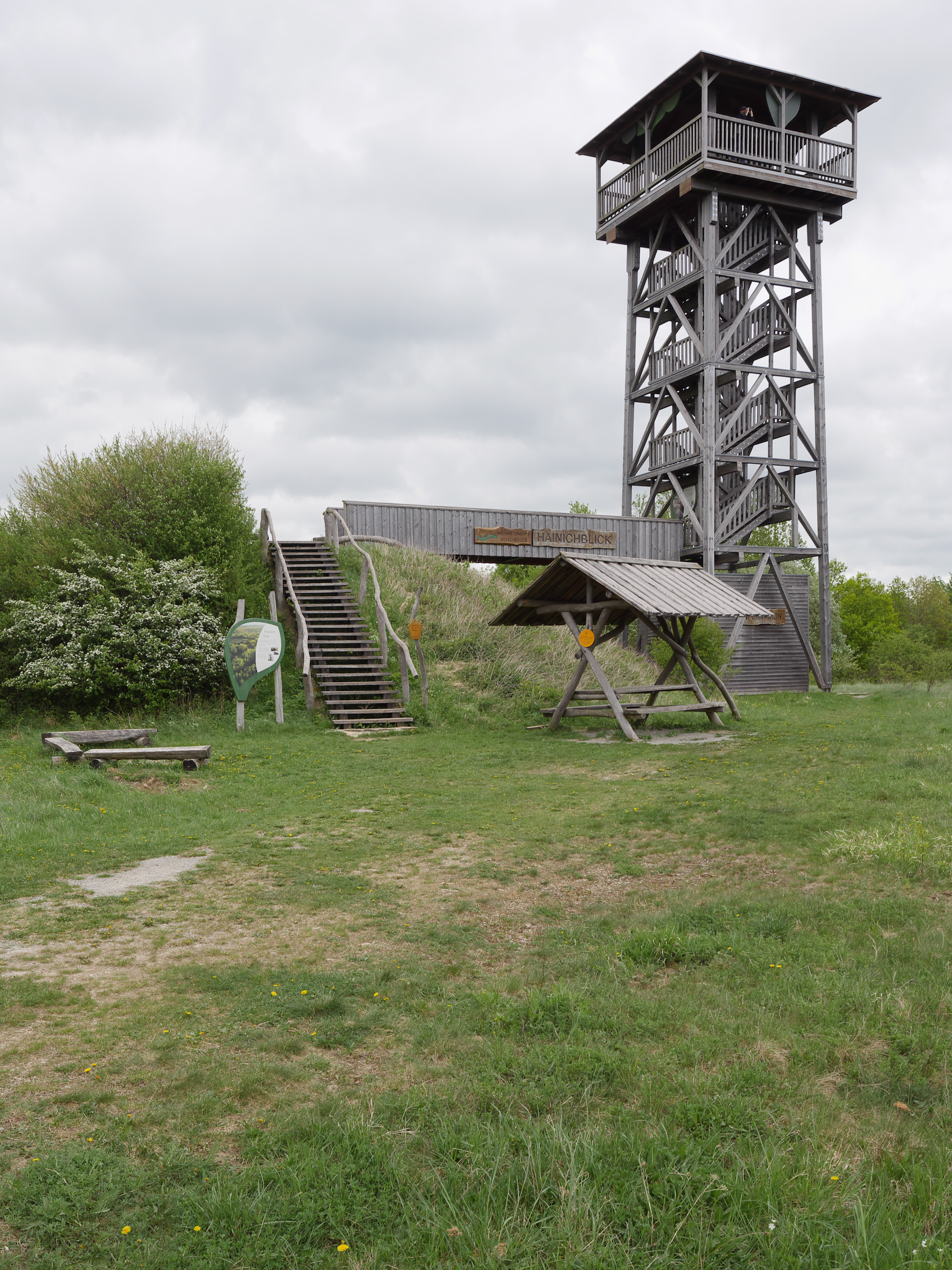 Aussichtsturm Hainichblick, Thüringen, Deutschland